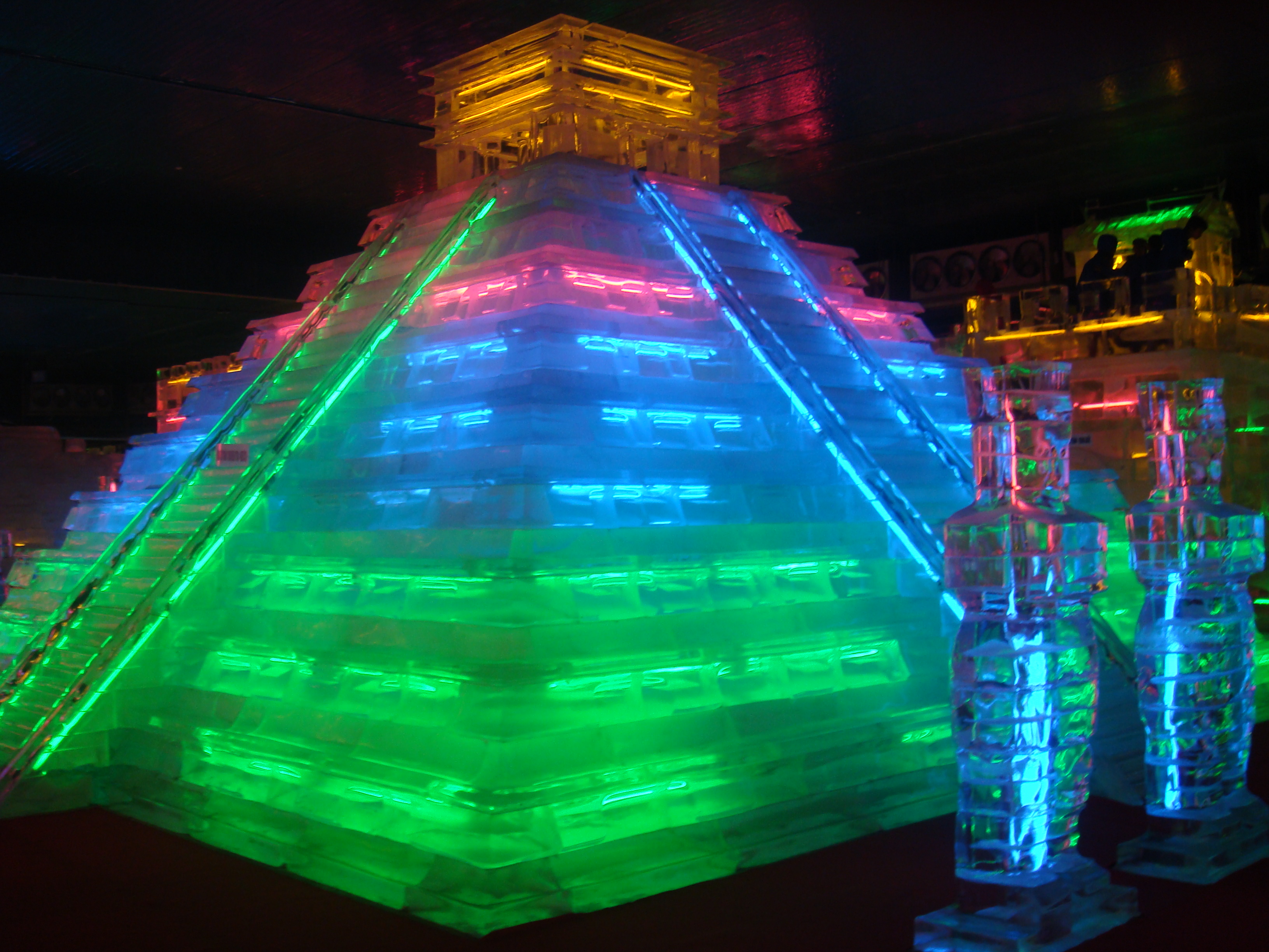 Hình chụp kim tự tháp Inca trong trò chơi Băng Đăng ở Đầm Sen